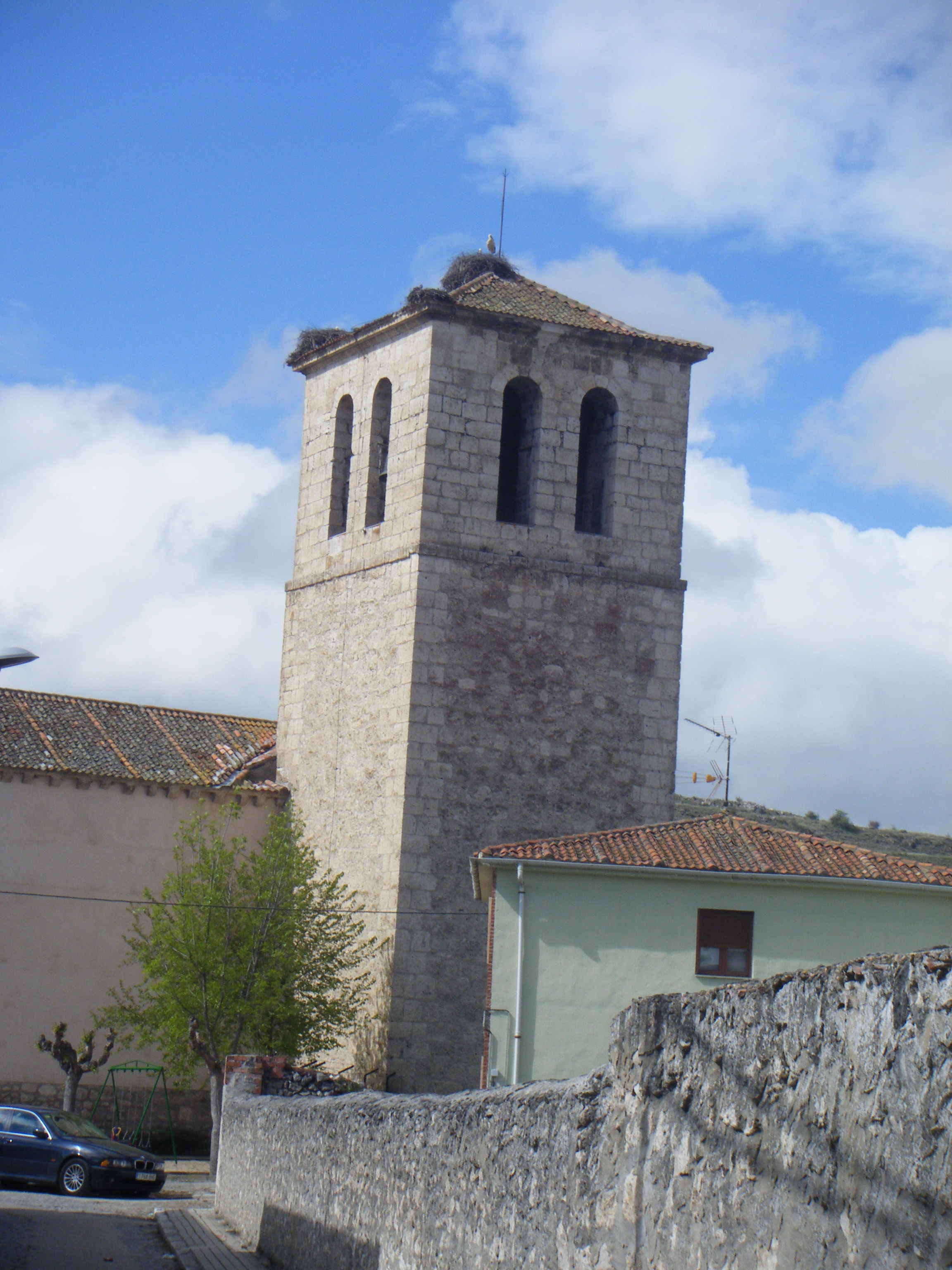 Kanpandorrea.